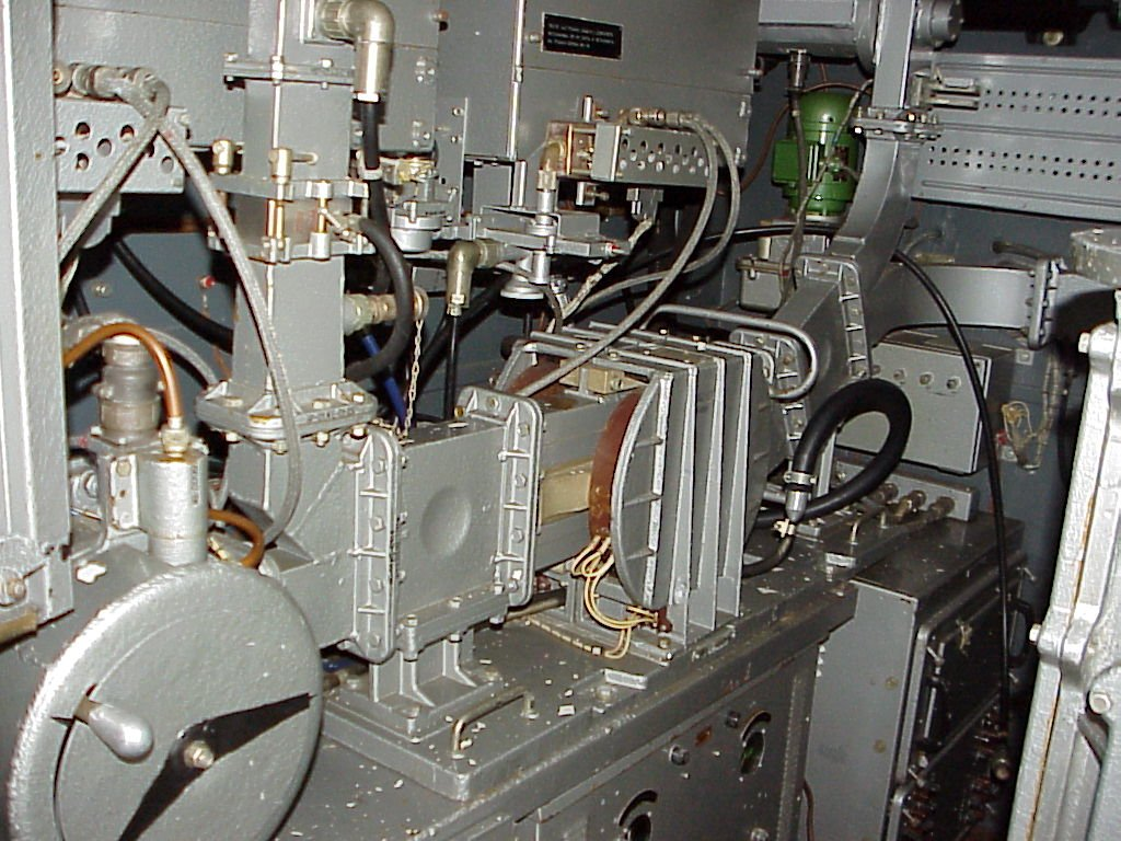 Ferritzirkulator in der Sende/Empfangskabine des Höhenfinders PRW-13